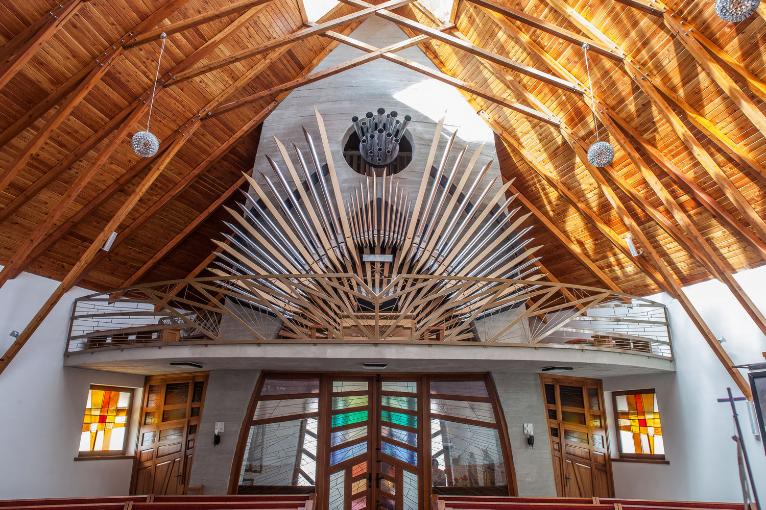 Reste római katolikus templom, 2015. Új orgona. APécsi Orgonaépítő Manufaktúra Kft. Magyar Kézműves Remek díjat vehetett át az orgona megalkotásáért 2015-ben.